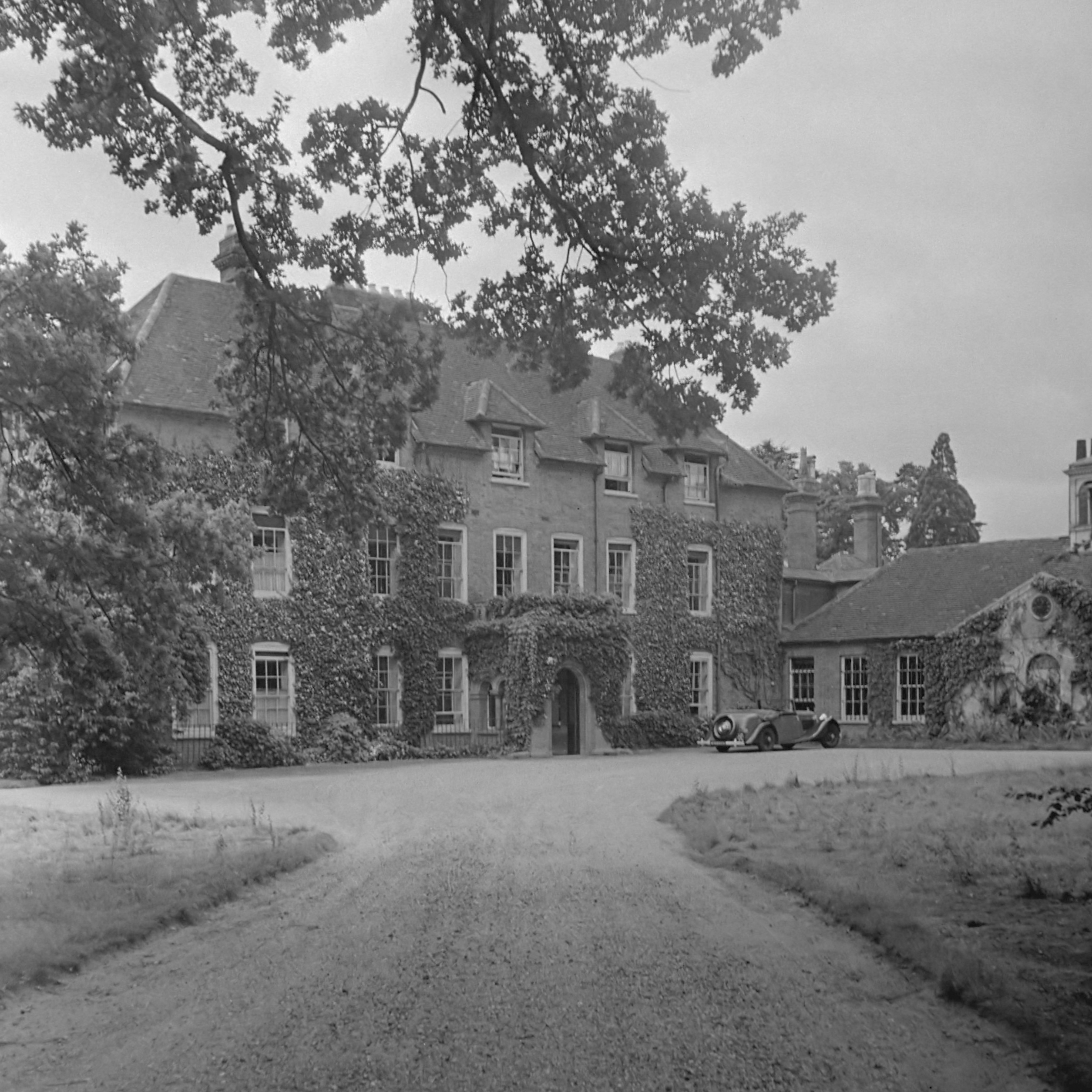 Koningin Wilhelmina reikt onderscheidingen uit aan leden van de koopvaardij en anderen. [Voorzijde Stubbing House. Rechts staat een auto geparkeerd] 1944